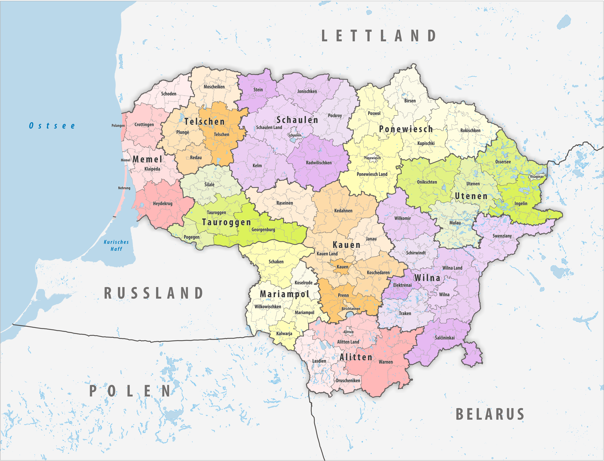 Politische Gliederung Litauens